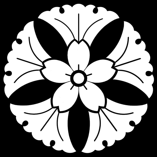 「銀杏に桜」紋（染抜）